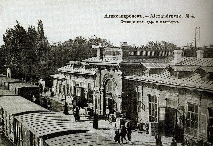 ЖД вокзал Александровск-1, ныне Запорожье-1 (1920 г.)